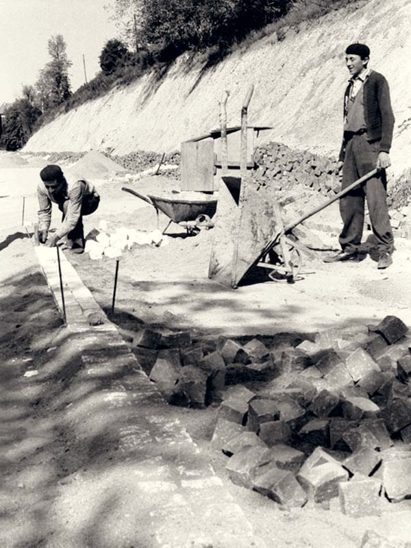 Noul Drum Livada Poştei-Poiana Braşov: Pietruirea drumului în zona între serpentina de la Turnul Negru şi Warthe.